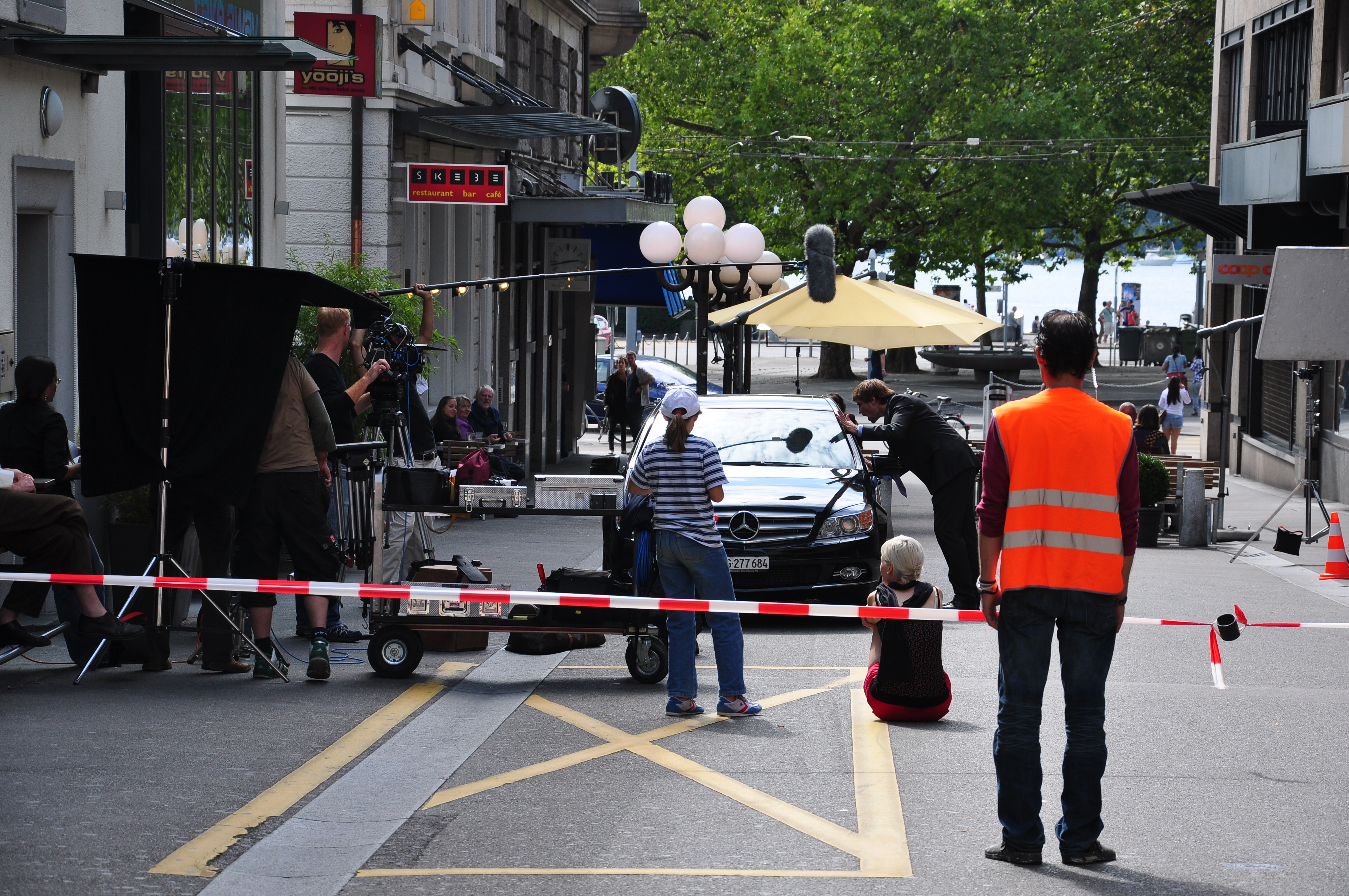 St. Urgan-Gasse in Zürich-Mühlebach (Switzerland)